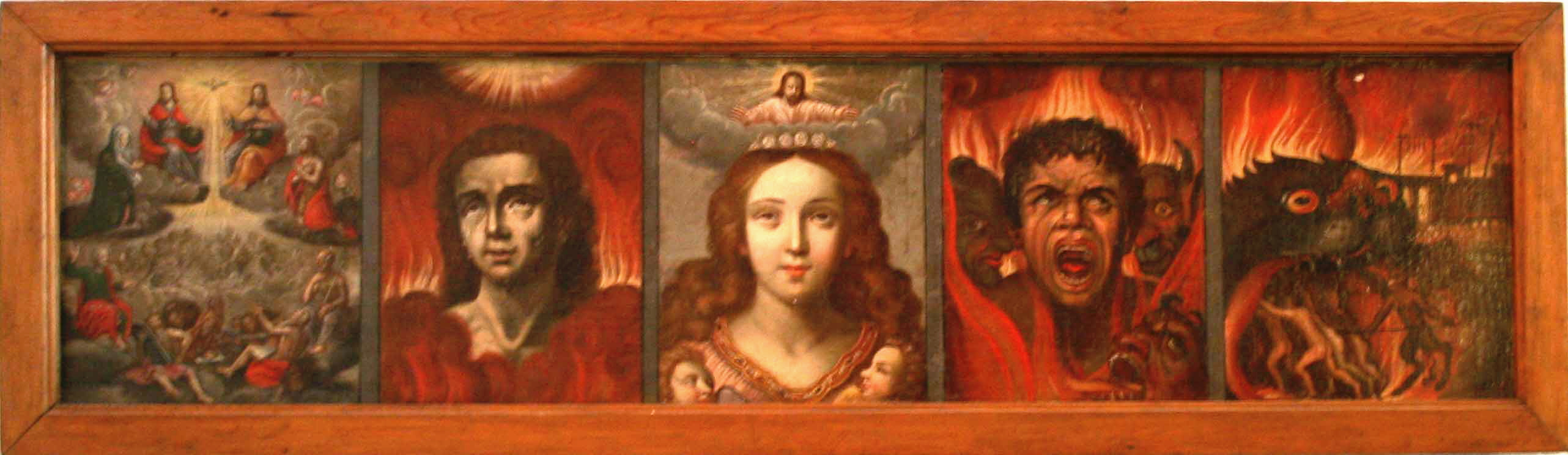 Prédelle du XVII° siècle représentant les âmes du purgatoire dans la collégiale Saint-Pierre de Six-fours.